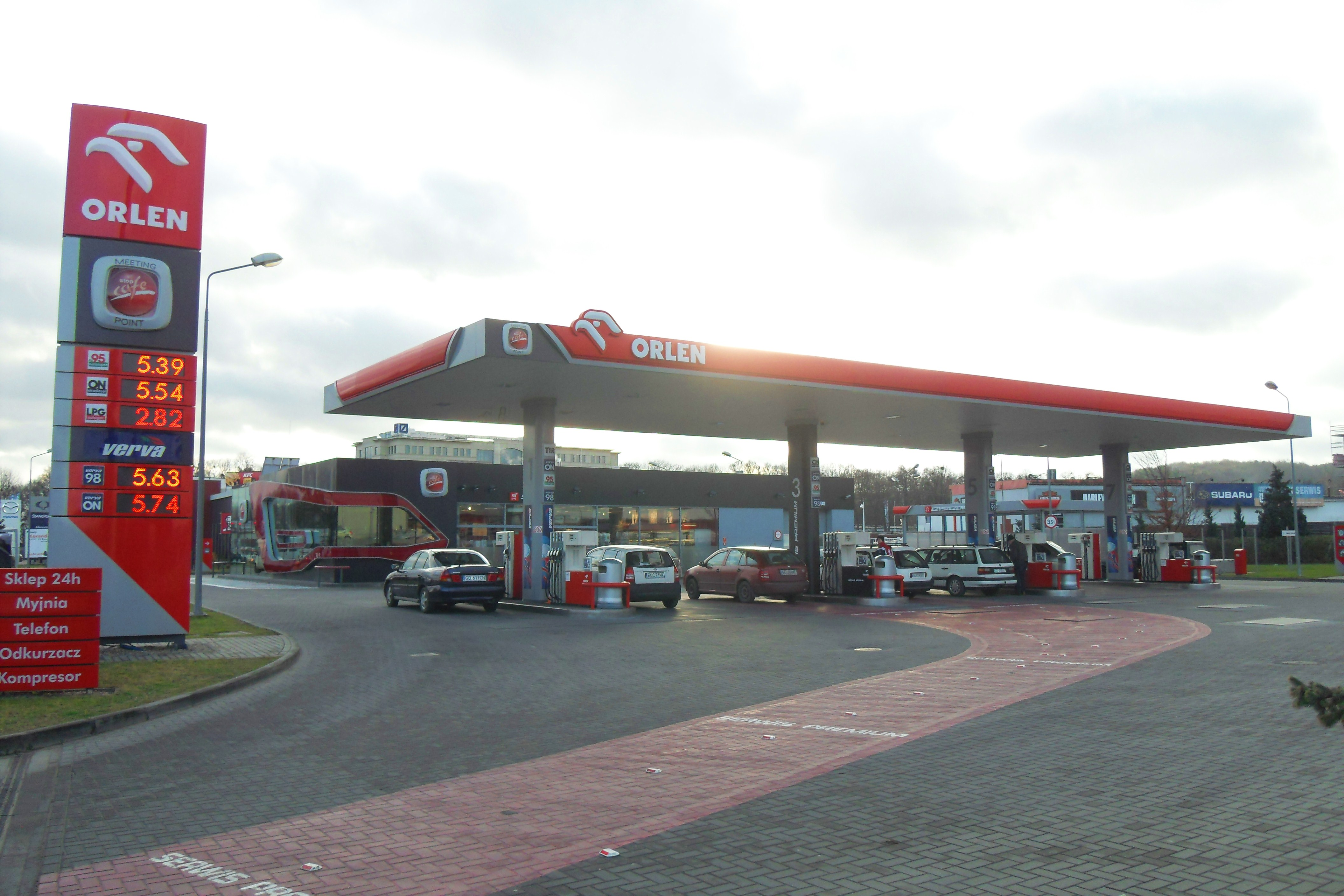 Gdańsk Oliwa, al. Grunwaldzka 258, "Orlen". Projekt stacji: Janusz Kaniewski.